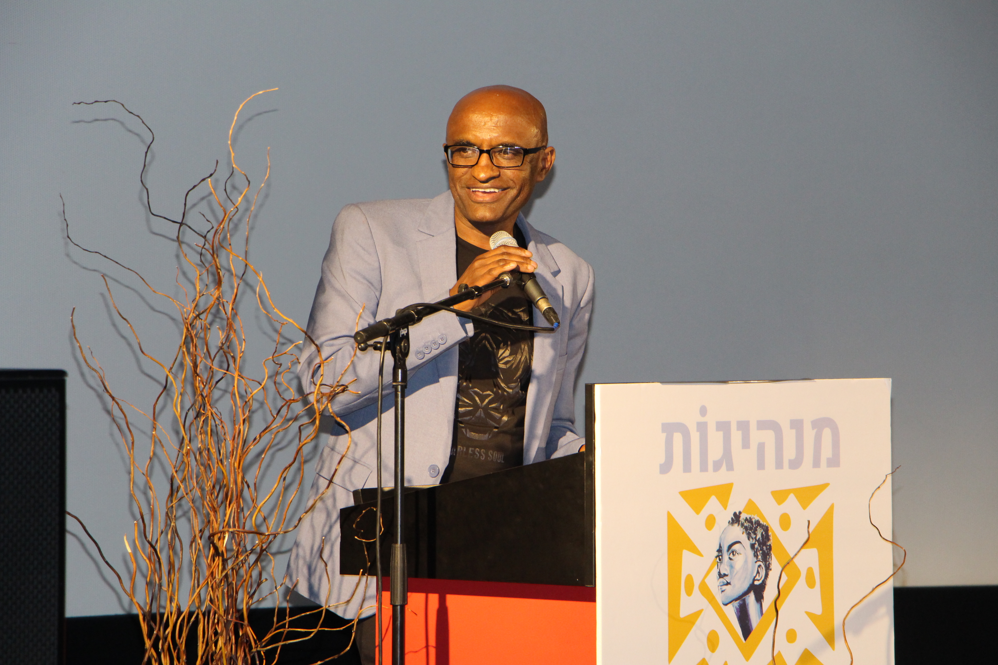 שמואל ילמה בכנס השלישי של פורום ירוסלם, שנערך בסינמטק תל אביב